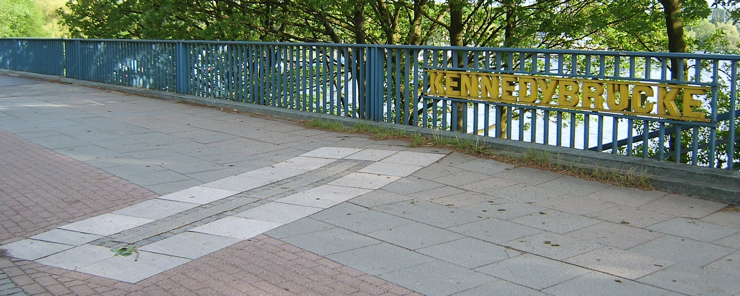 Der 10. Längengrad auf der Kennedybrücke in Hamburg-St. Georg. Der Namenszug aus Metall vom Bildhauer Ernst Hanssen wurde Ende März 1964 in das Brückengeländer eingefügt. Quelle